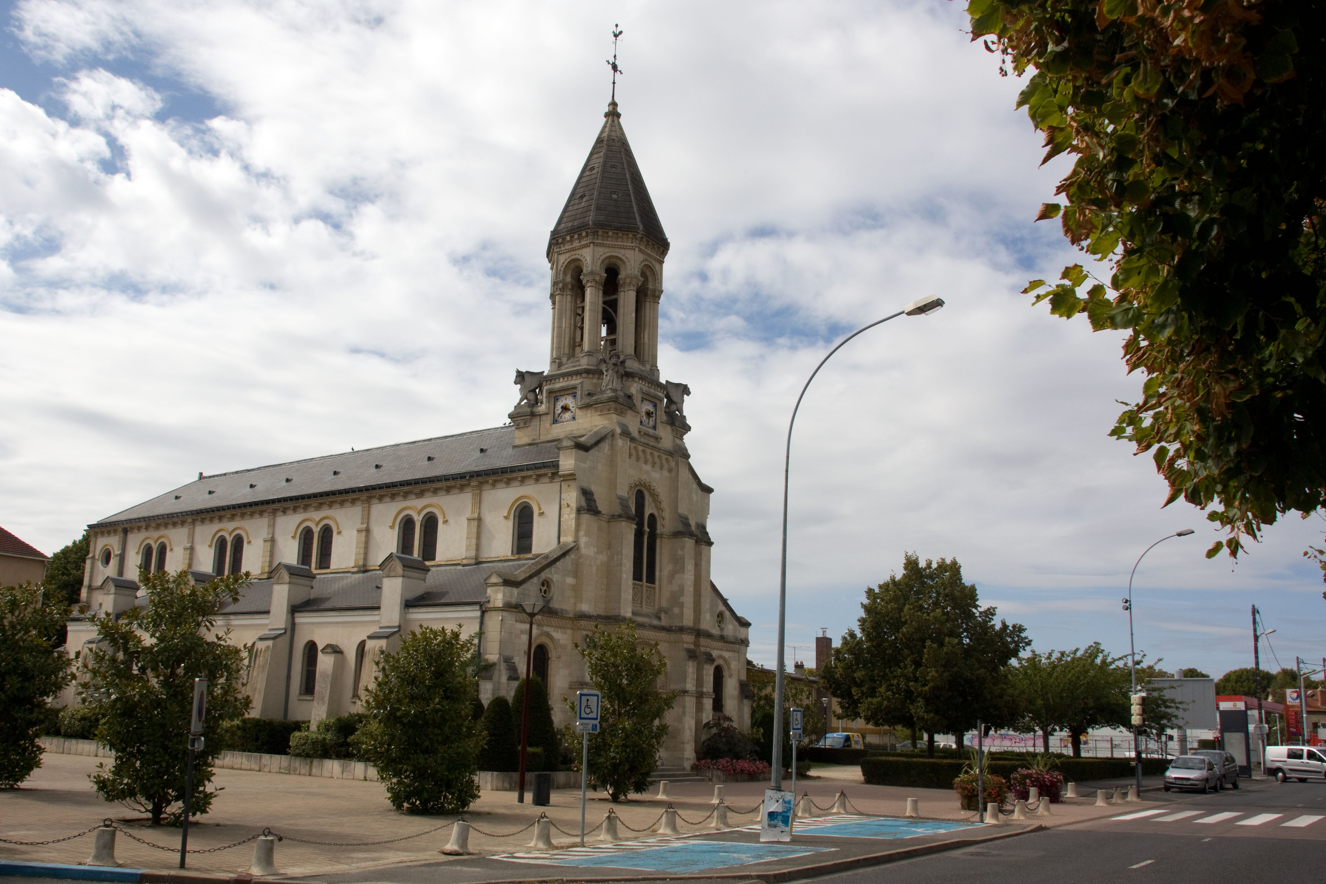 L'église de Ris-Orangis, Ris-Orangis, Essonne, Ris-Orangis